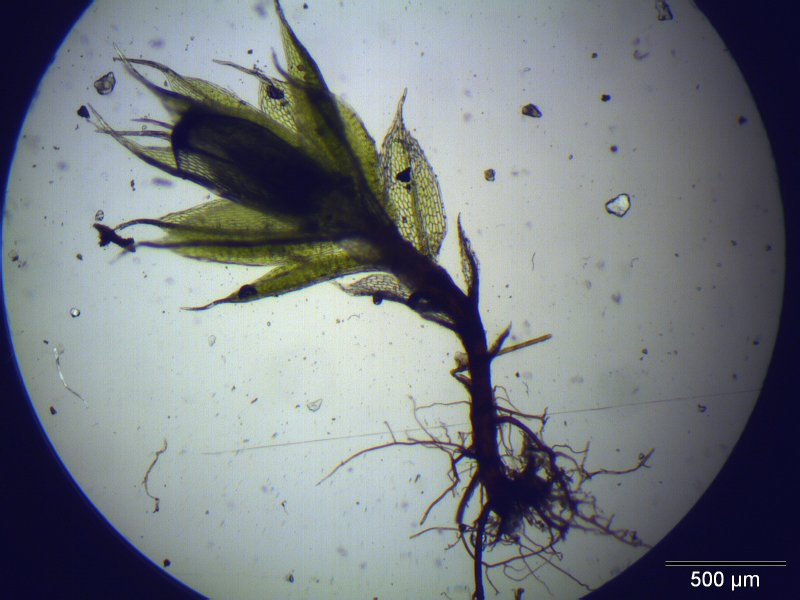 Zierliche Birnmoos (Bryum elegans), Habitus unter dem Mikroskop, Vergrößerung: 40x